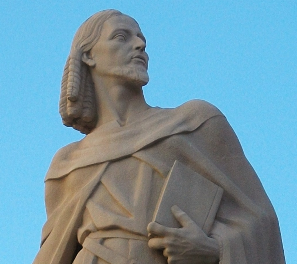 Escultura en pedra de Josep Rausell Sanchis a Gandia representant Ausiàs March. Creada el 1959